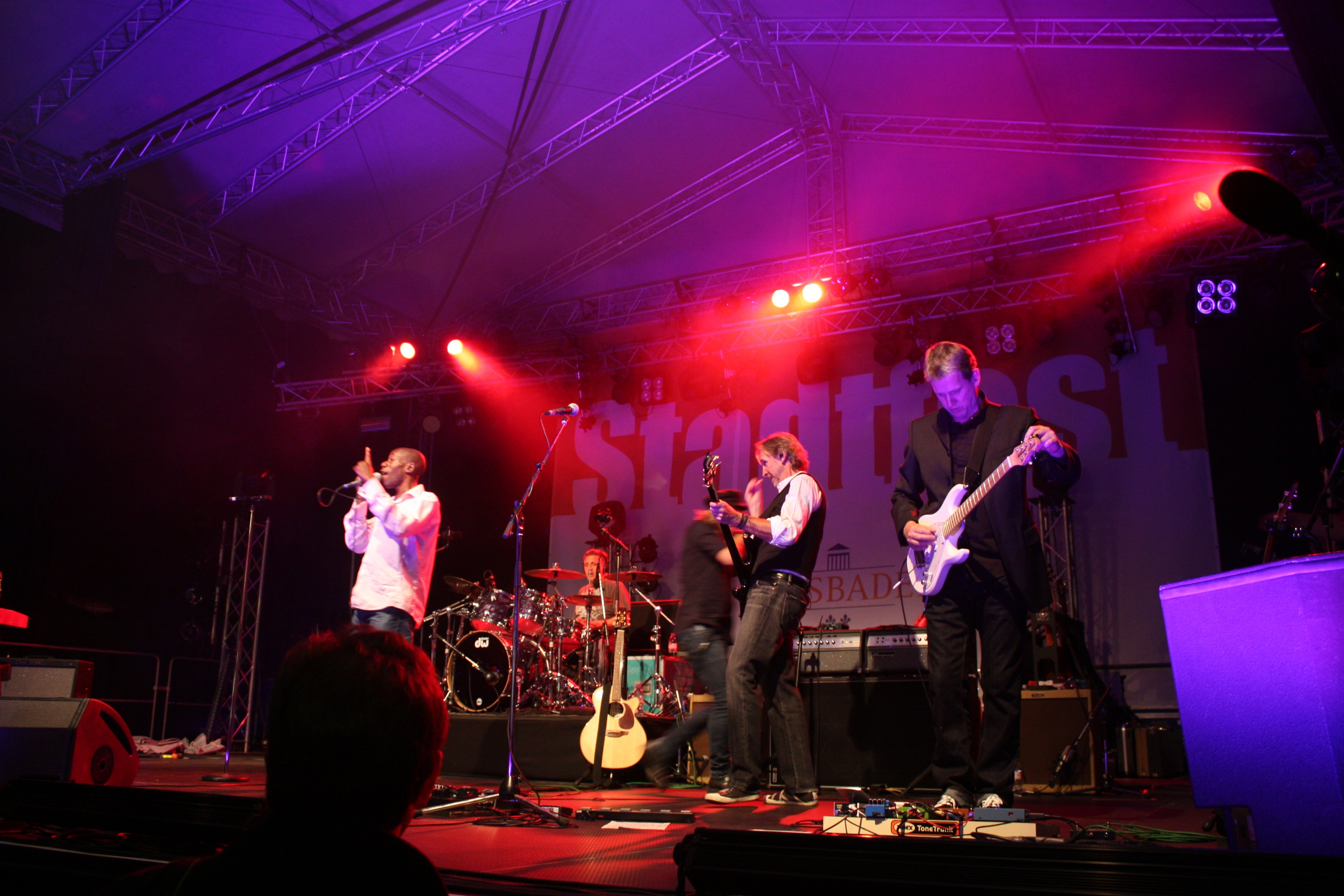 Wiesbadener Stadtfest 2013: Mike & the Mechanics